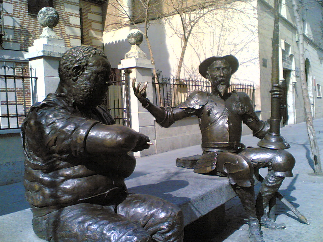 Front Cervantes's natal house